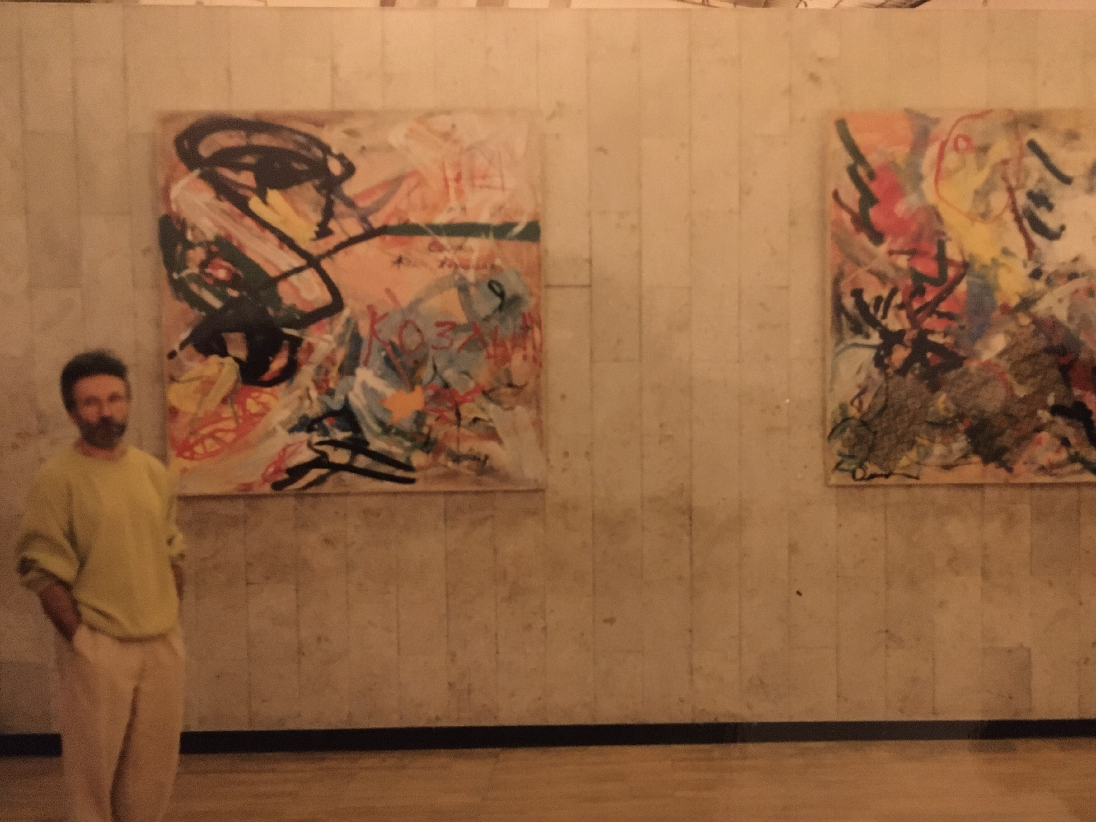 zur Ausstellungseröffnung in der staatlichen Tretjakowgalerie Moskau (12.05.1993)